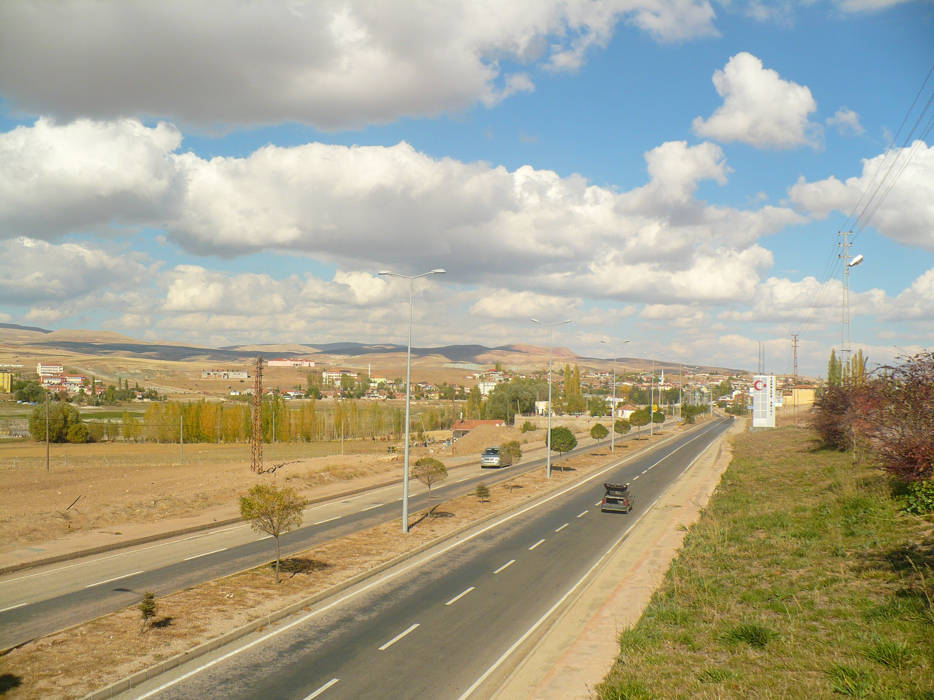 Pınarbaşı, Kayseri, Türkiye